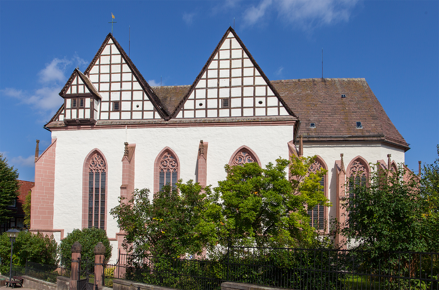 Klosterkirche in Blomberg, Südseite This is the photograph of an architectural monument. It is part of the list of cultural monuments of Blomberg, no. 37